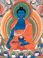 Medizinbuddha